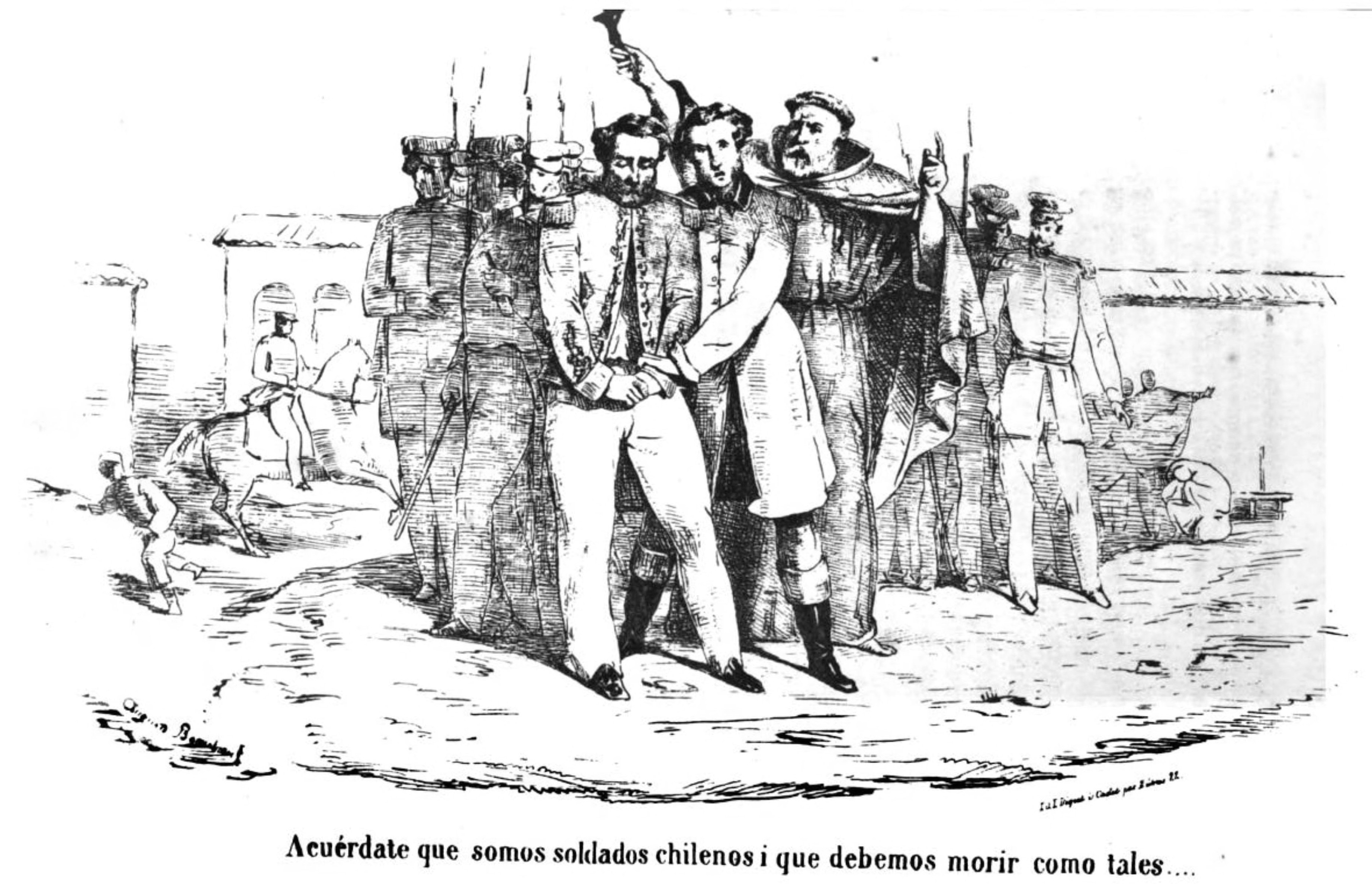 Fusilamiento de los Hermanos Juan José y Luis Carrera (8 de abril de 1818)